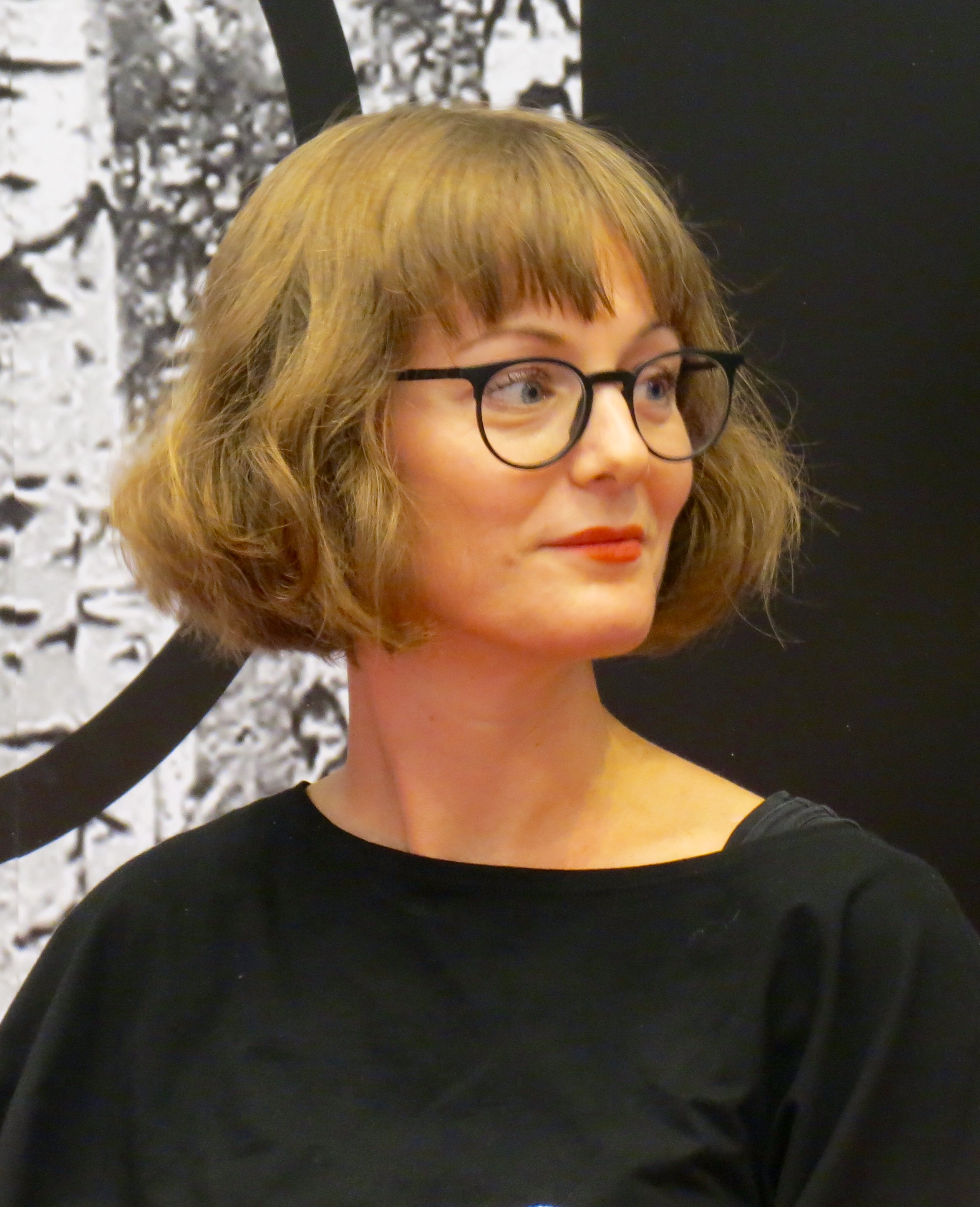 Finlandssvenska barnboksförfattaren Lena Frölander-Ulf på Bokmässan i Göteborg 2018.